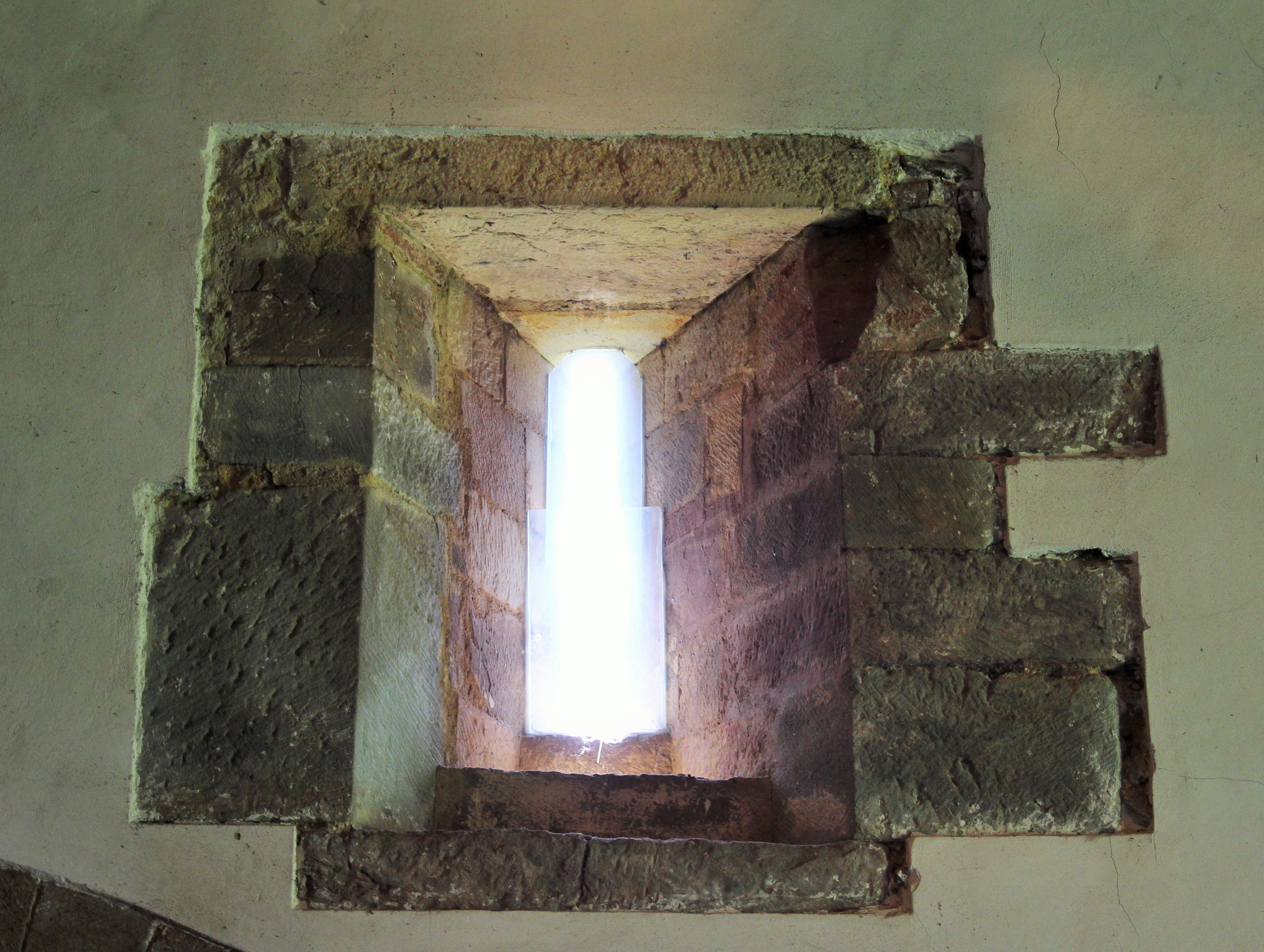 Ventana al sur